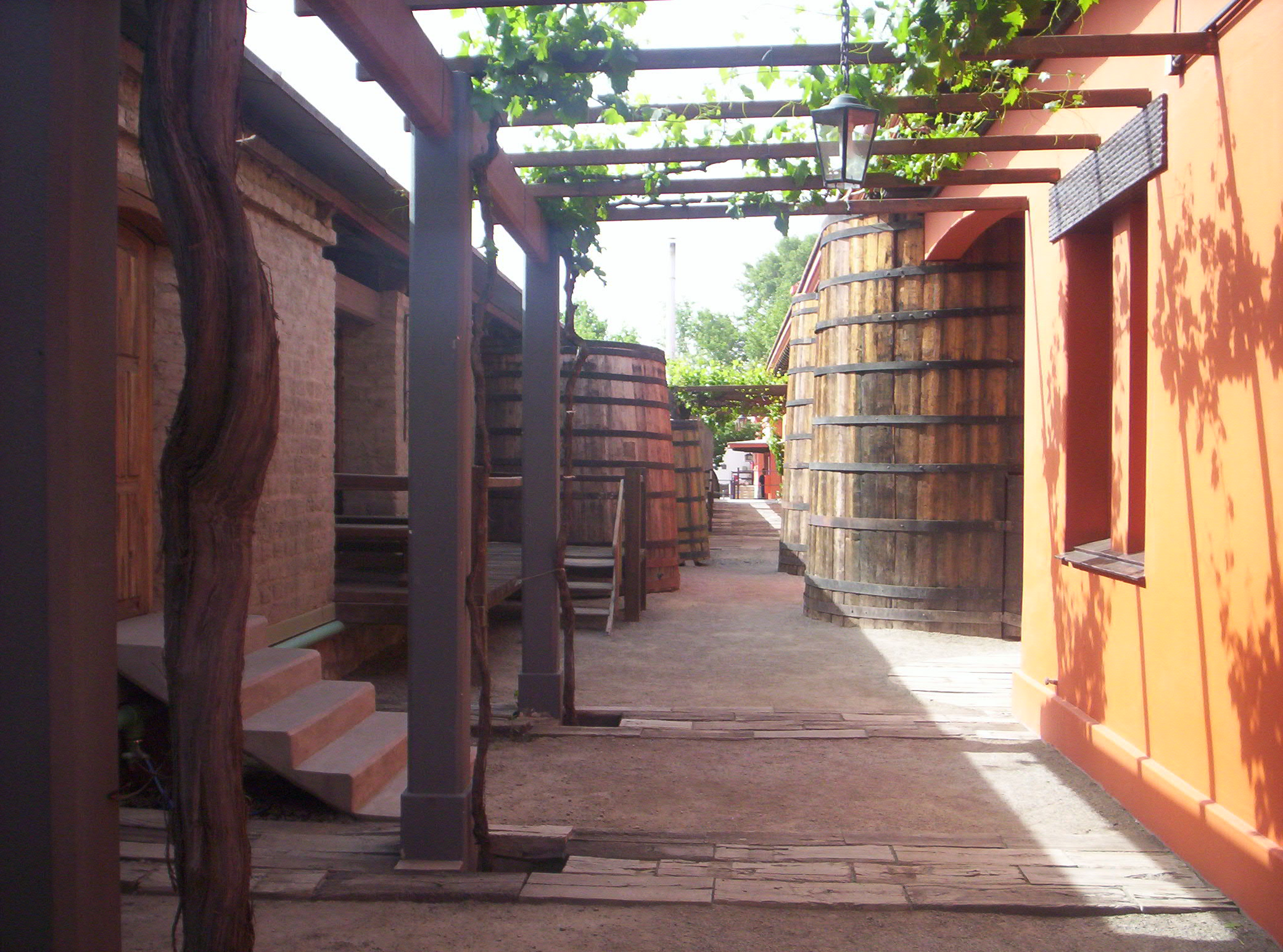 museo grafigna en una de sus partes